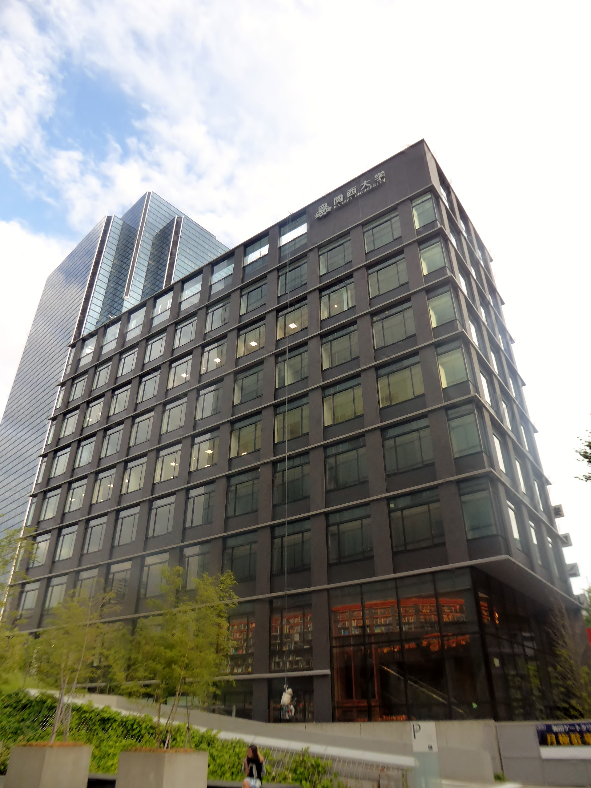 工事中の関西大学梅田キャンパスを撮影。